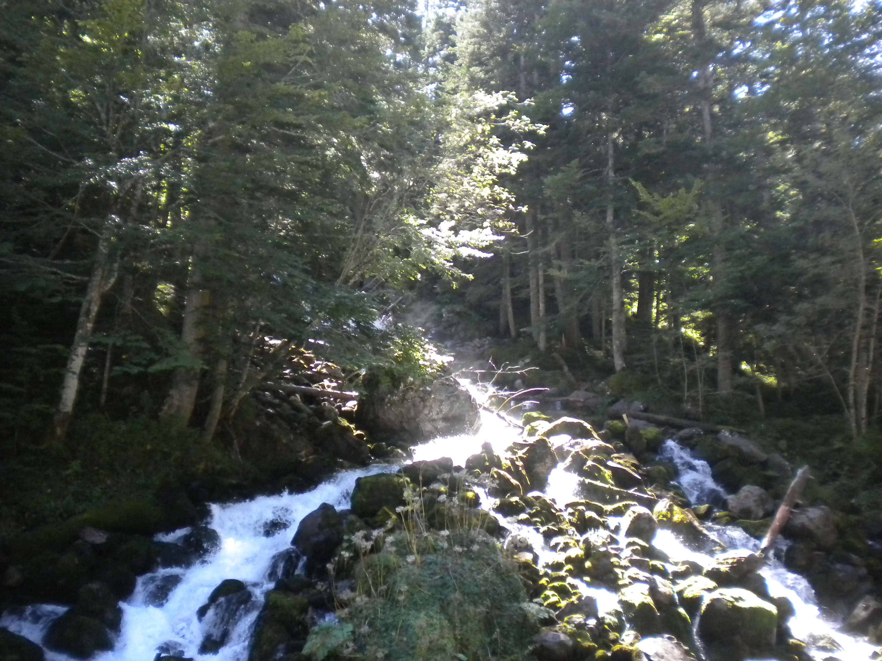 Els Ulls del Joeu, conegut en aranès com Uelhs deth Joèu, són les fonts d'un dels afluents de la Garona, després d'un recorregut subterrani de més de 3 quilomètres des del Forat d'Aigualluts.